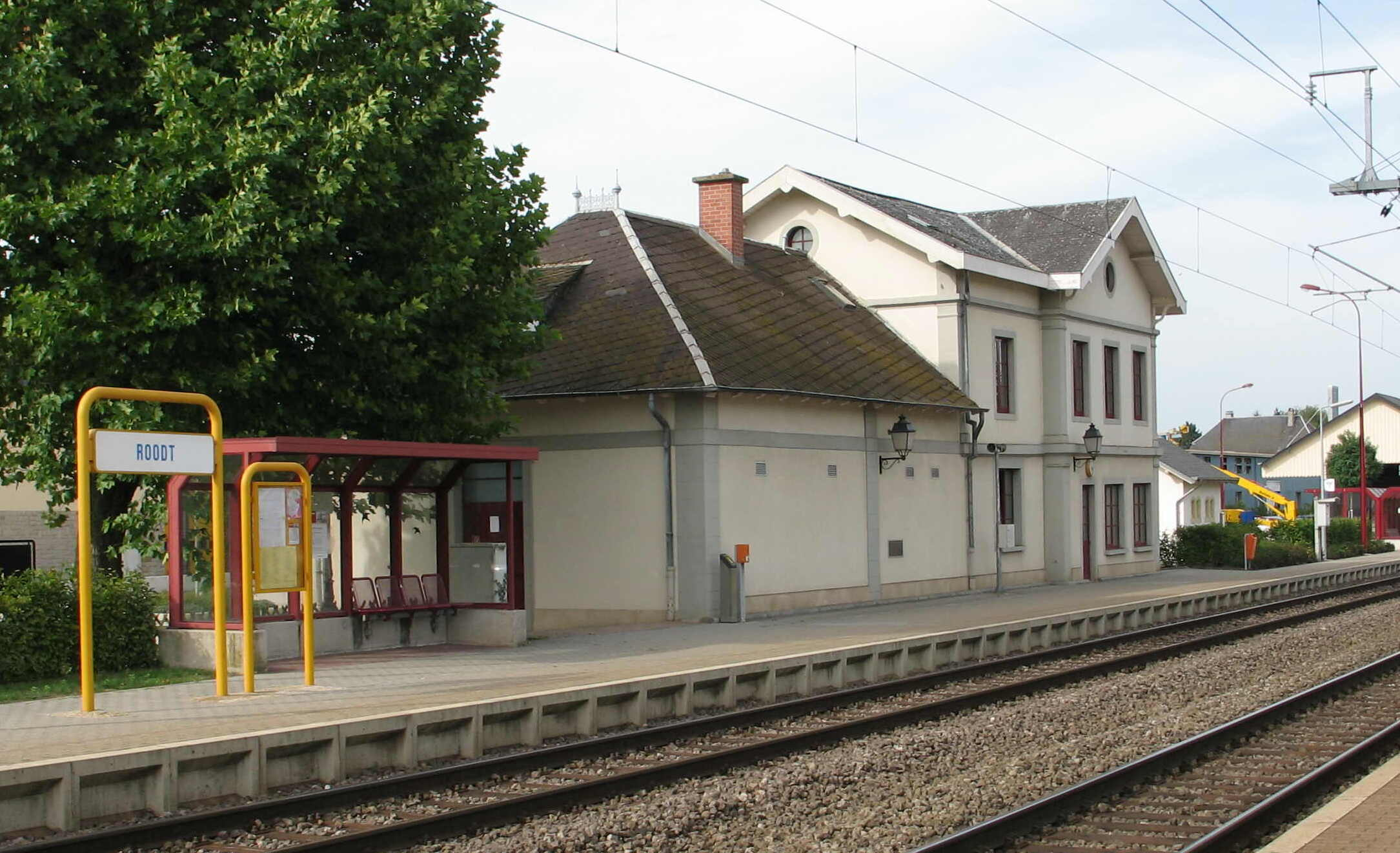 Gare vu Rued-Sir